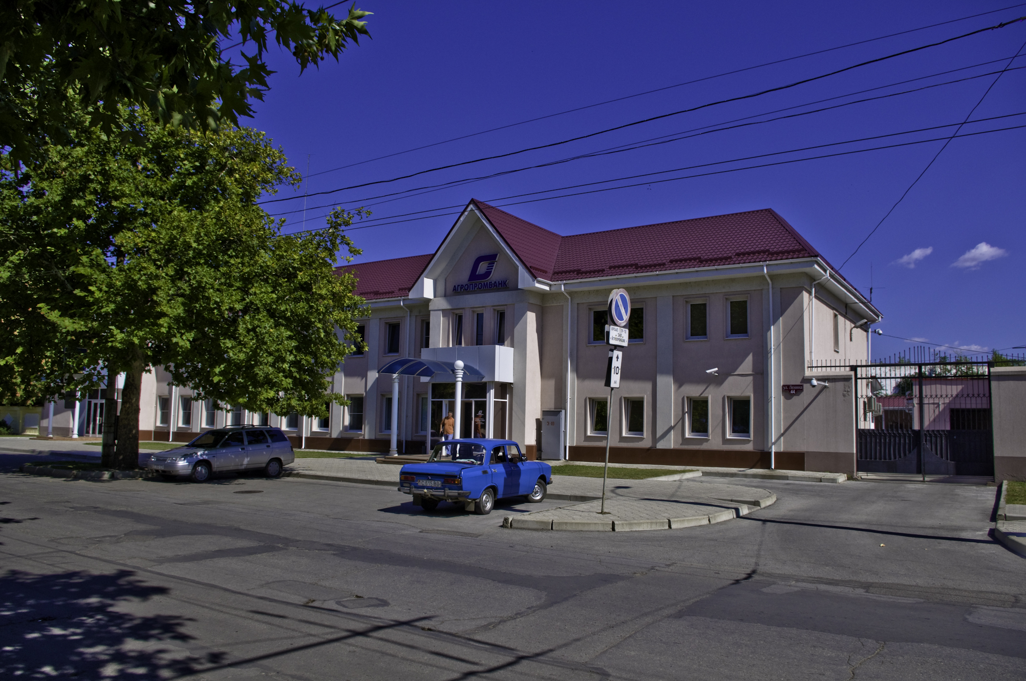 Главное здание "Агропромбанка" в Тирасполе. Адрес: улица Ленина 44